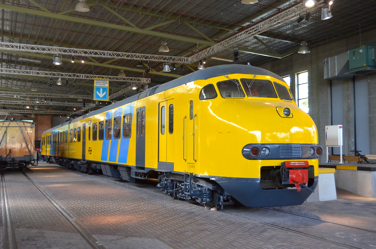 Nederlands Spoorwegmuseum treinstel NS 876. Foto: Erik Swierstra.